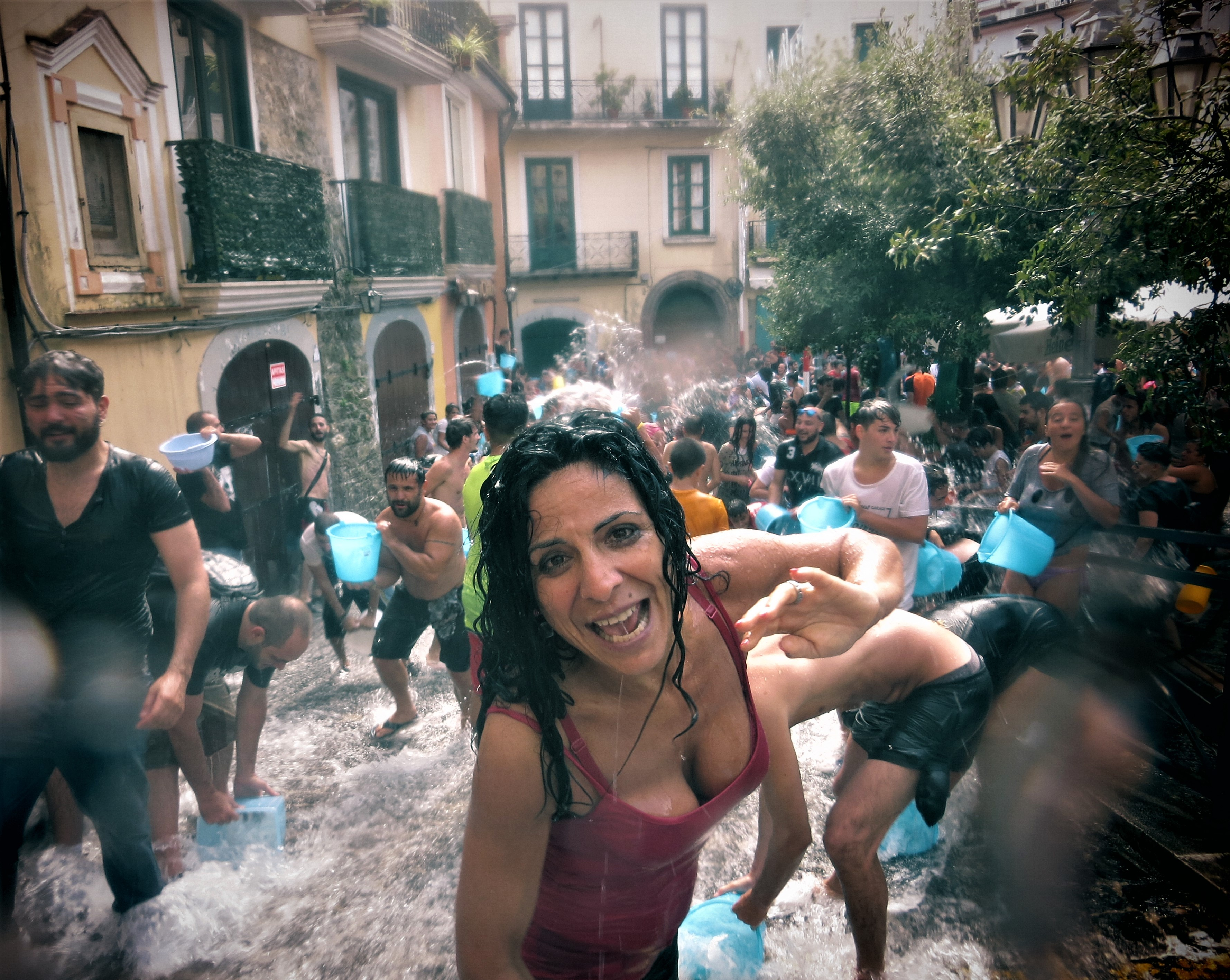 Chiena di Campagna 2016 Napulitano: 'A secchiata d' 'a Chiena (Campagna)